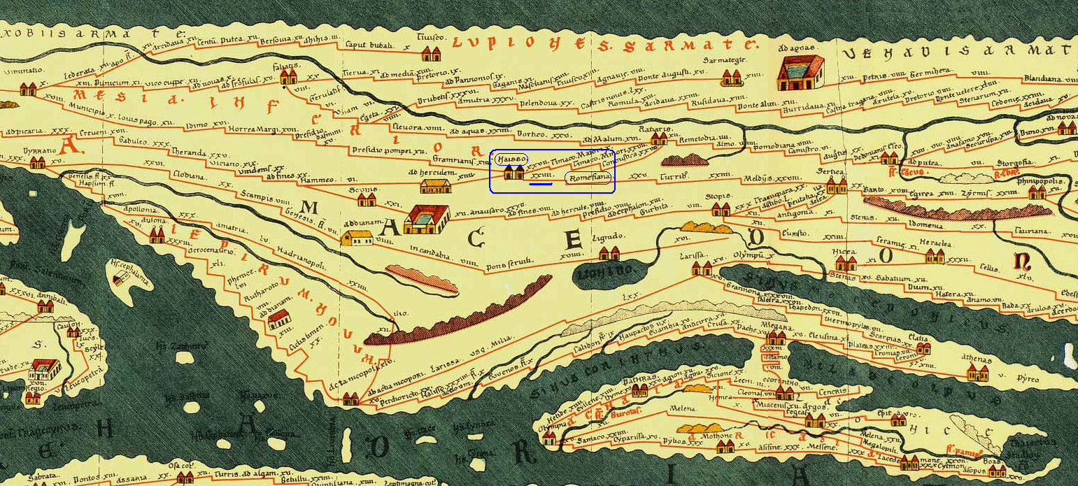 Uokviren iz Tabule Peutingeriane je Bela Palanka (Romesiana) na rastojanju од XXIV rimskih milja od Niša (Naissa). Za izradu slike korišćena je ova sa ostave.